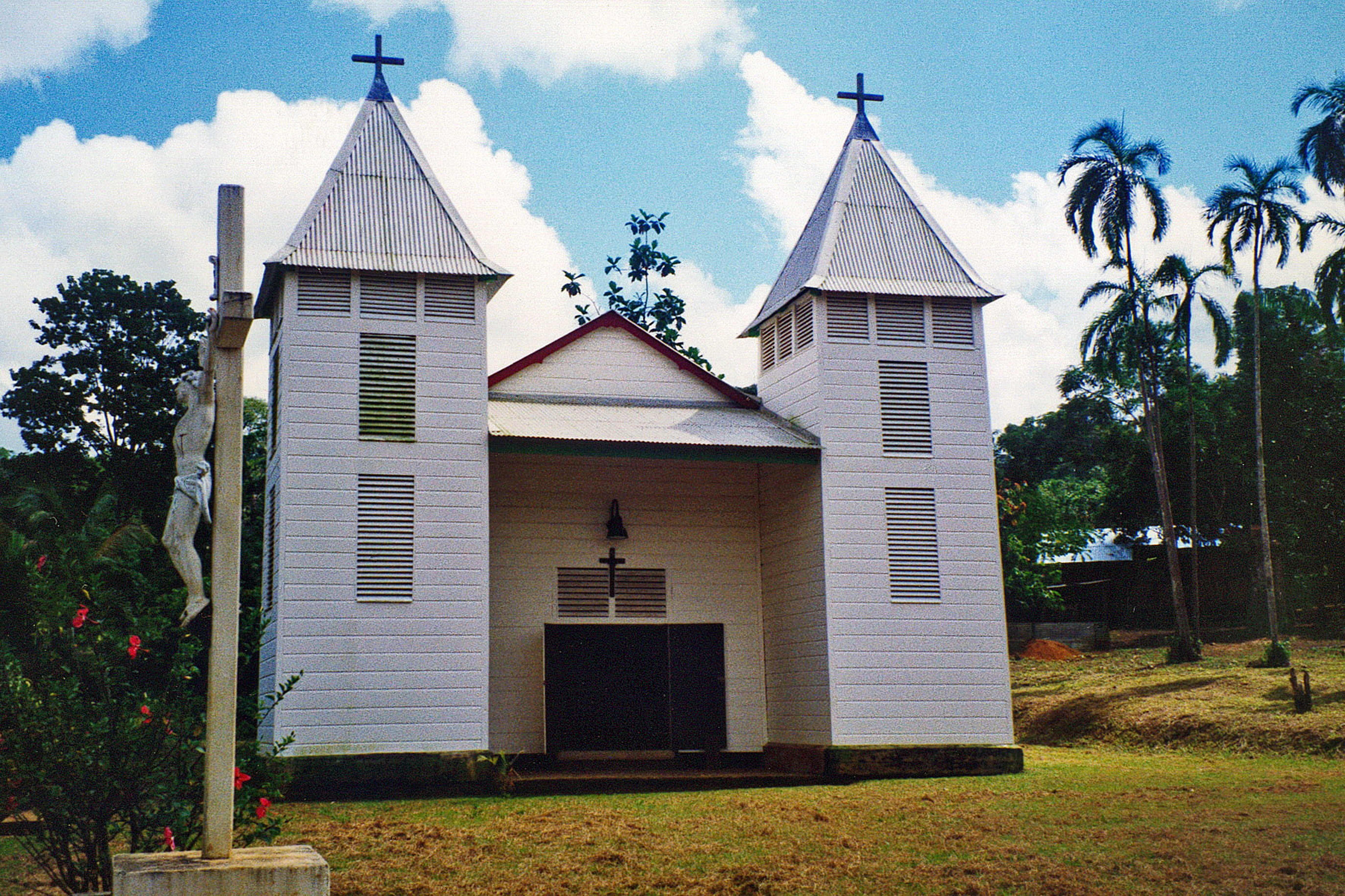 Église Saint-Antoine-de-Padoue de Saül, (Classé, 1993) .